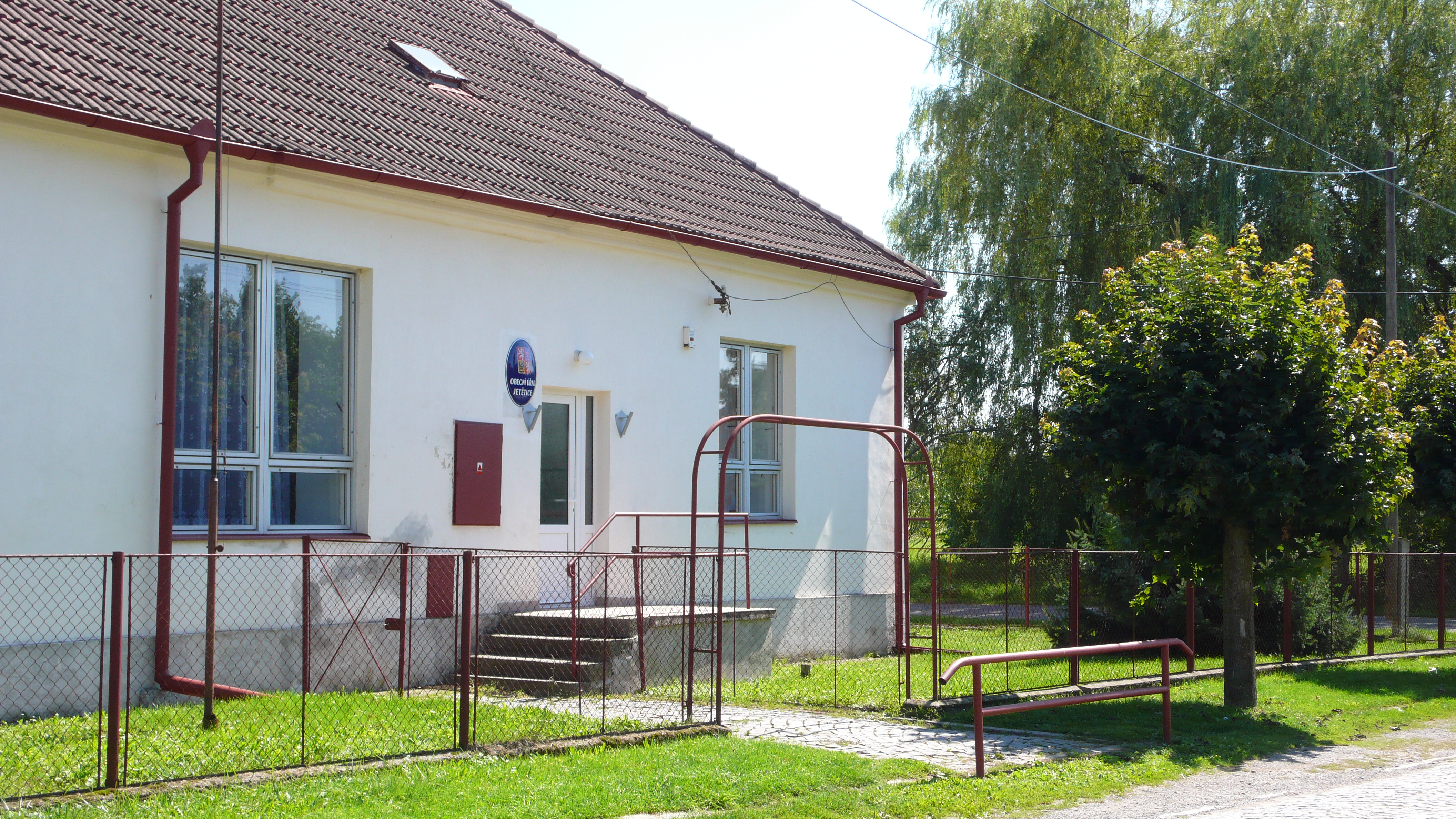 Obecní úřad v Jetěticích (2010)